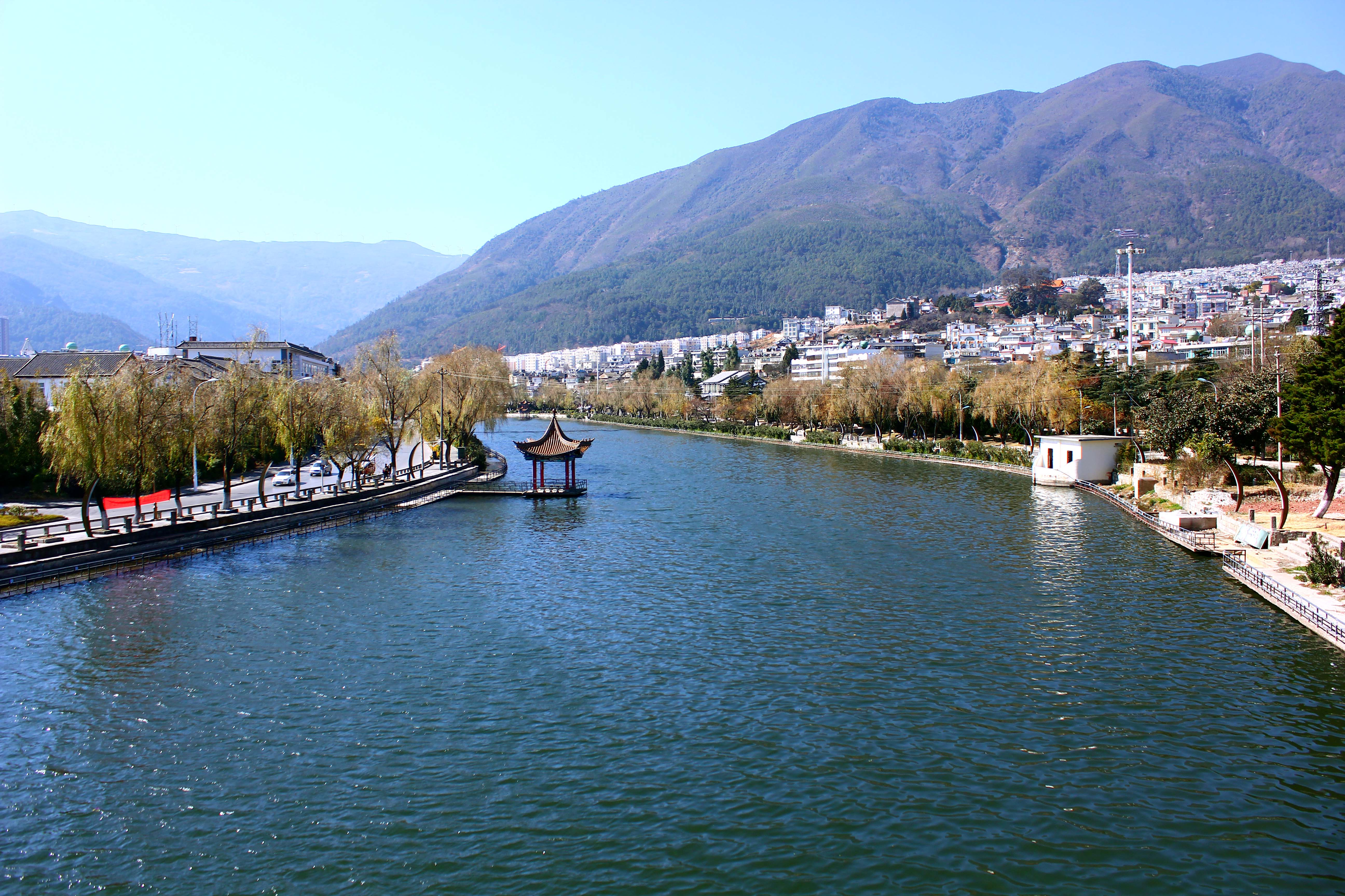 中国云南大理市的西洱河，拍摄于美登桥，面向西南方向。